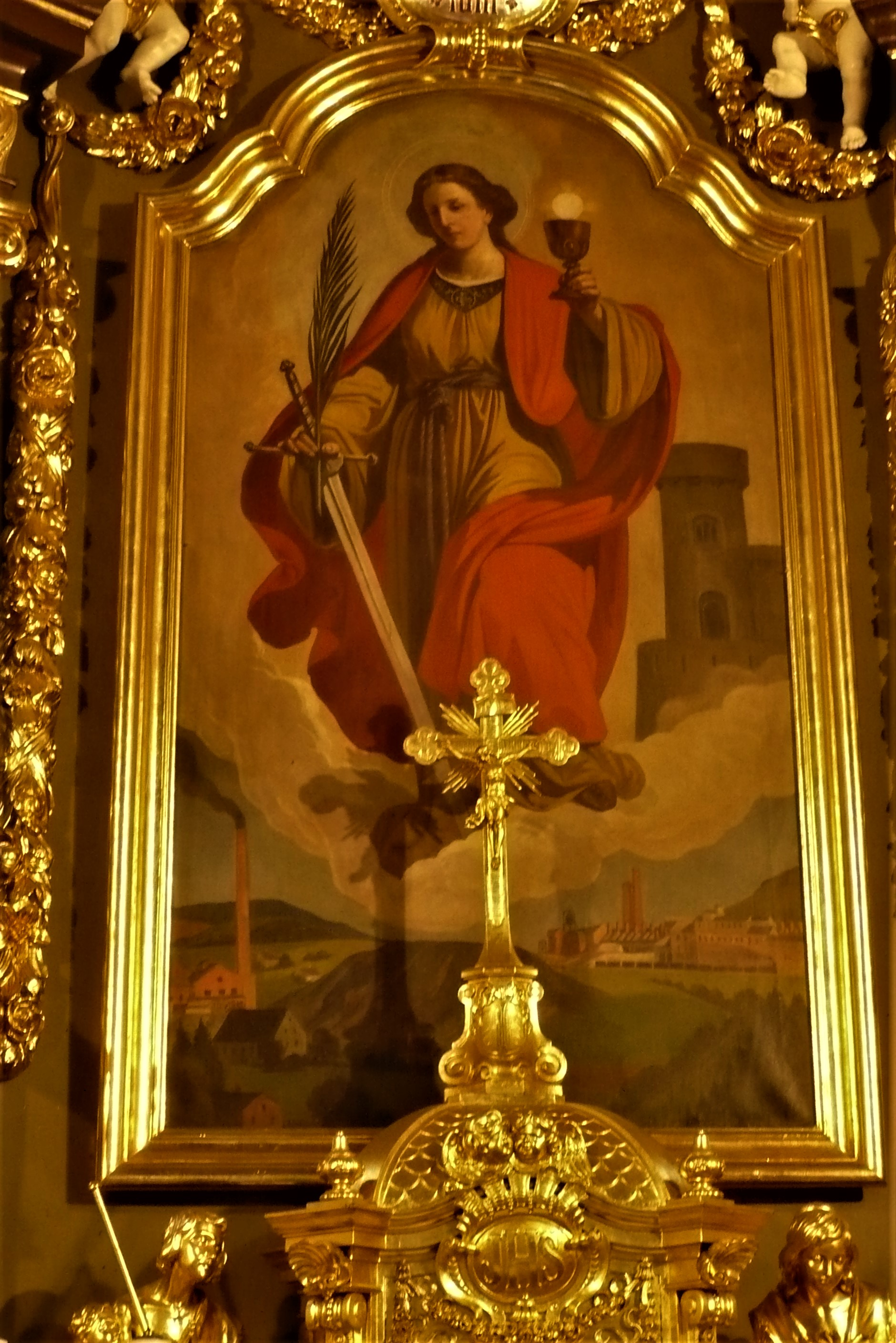 Kościół Barbary w Nowej Rudzie. Obraz na ołtarzu z panoramą Drogosławia